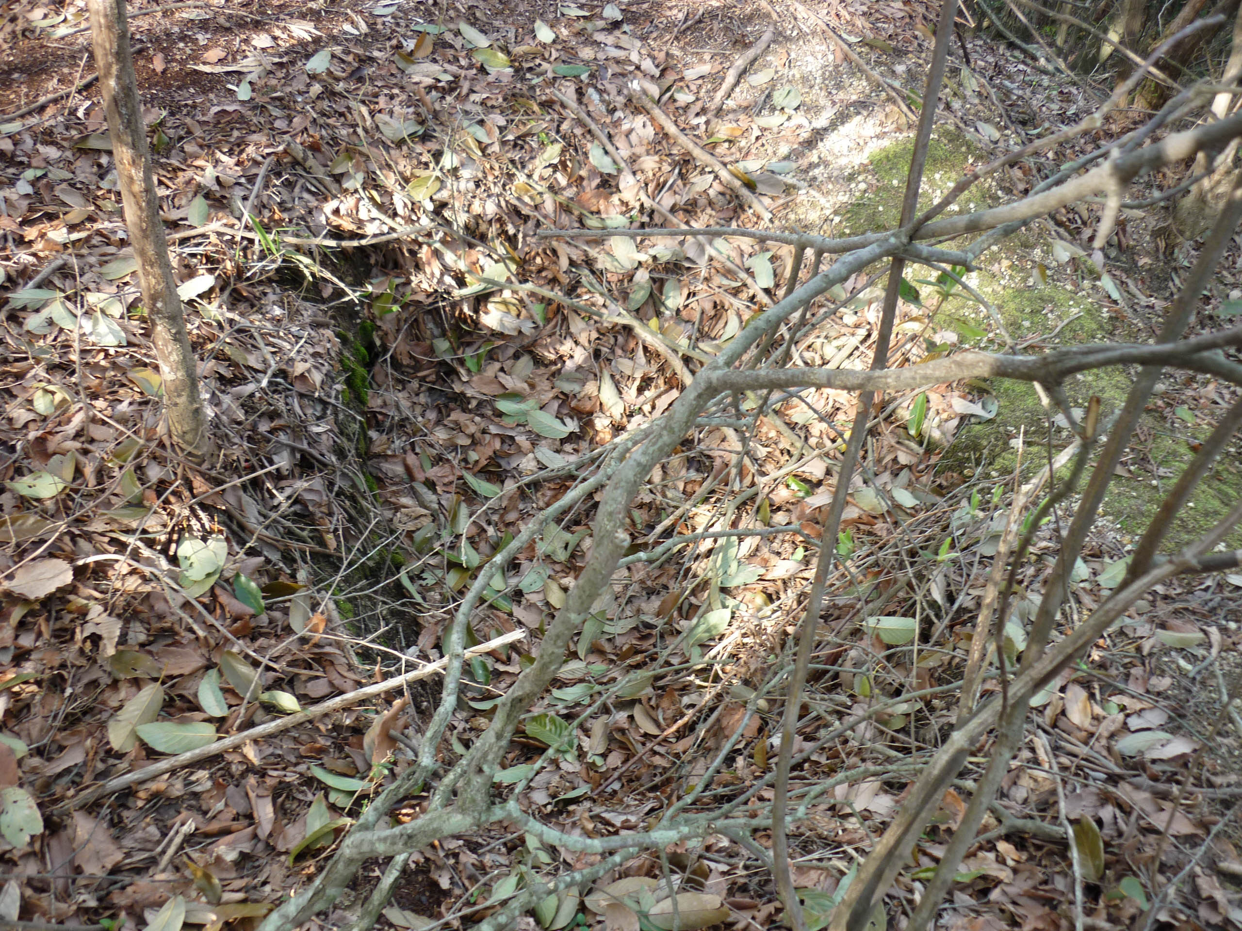 武者隠し